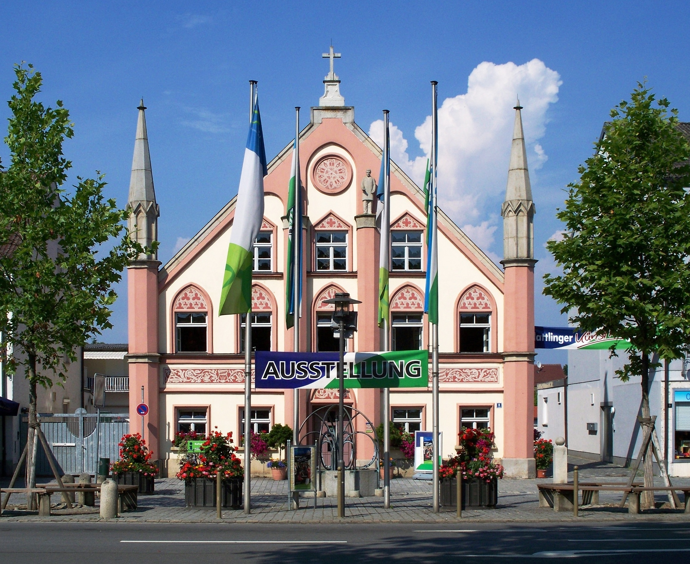 Ehemaliges Bürgerspital, jetzt Kultur- und Tourismusamt, Ludwigplatz 8 in Plattling, Landkreis Deggendorf, Bayern, Deutschland.